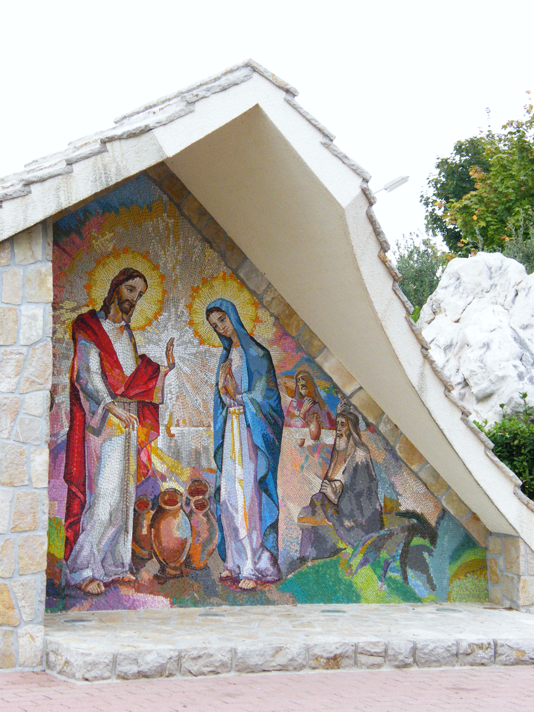 Jedna ze stacji drogi krzyżowej obok Kościoła św.Jakuba.